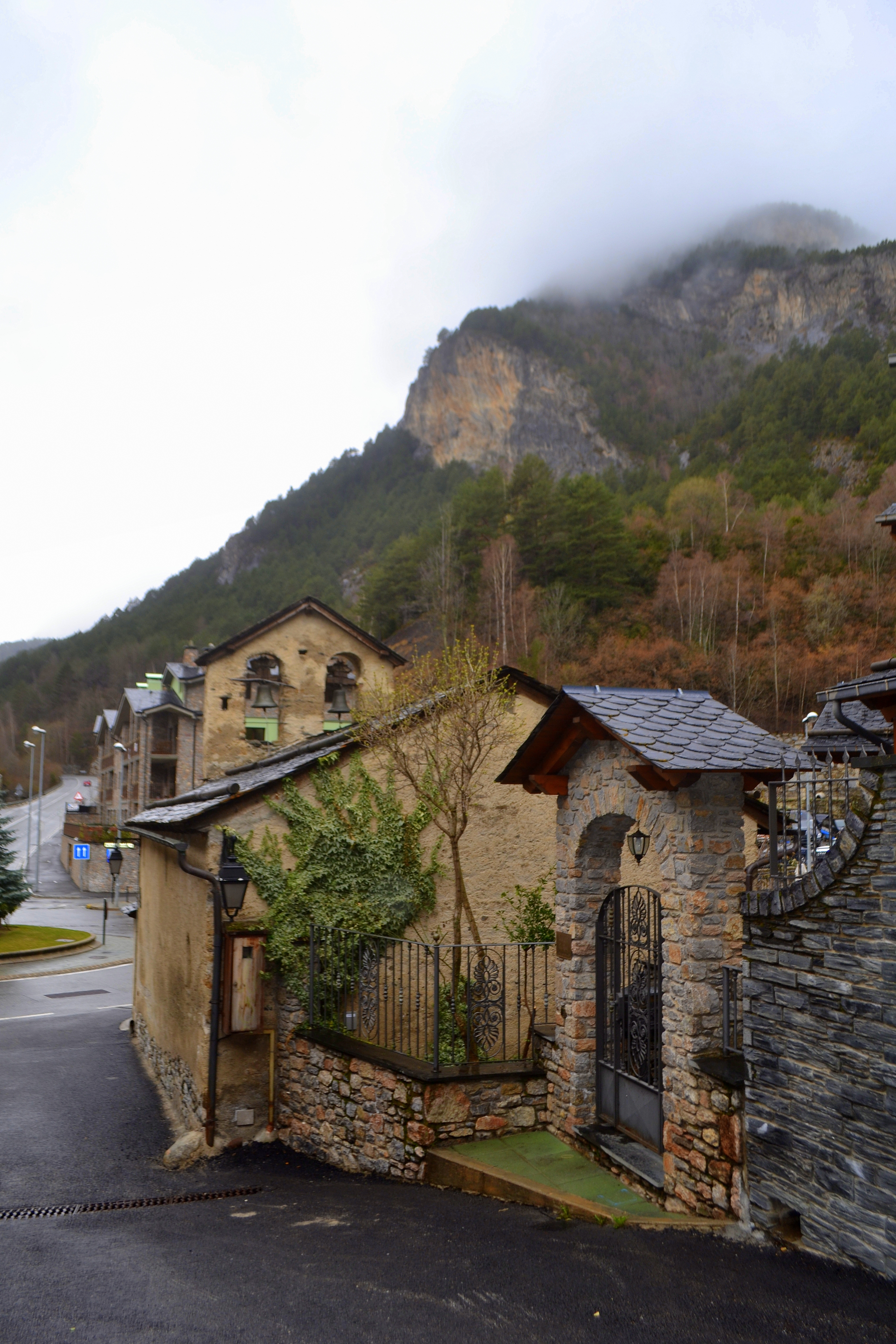 Església de Sant Romà d'Erts